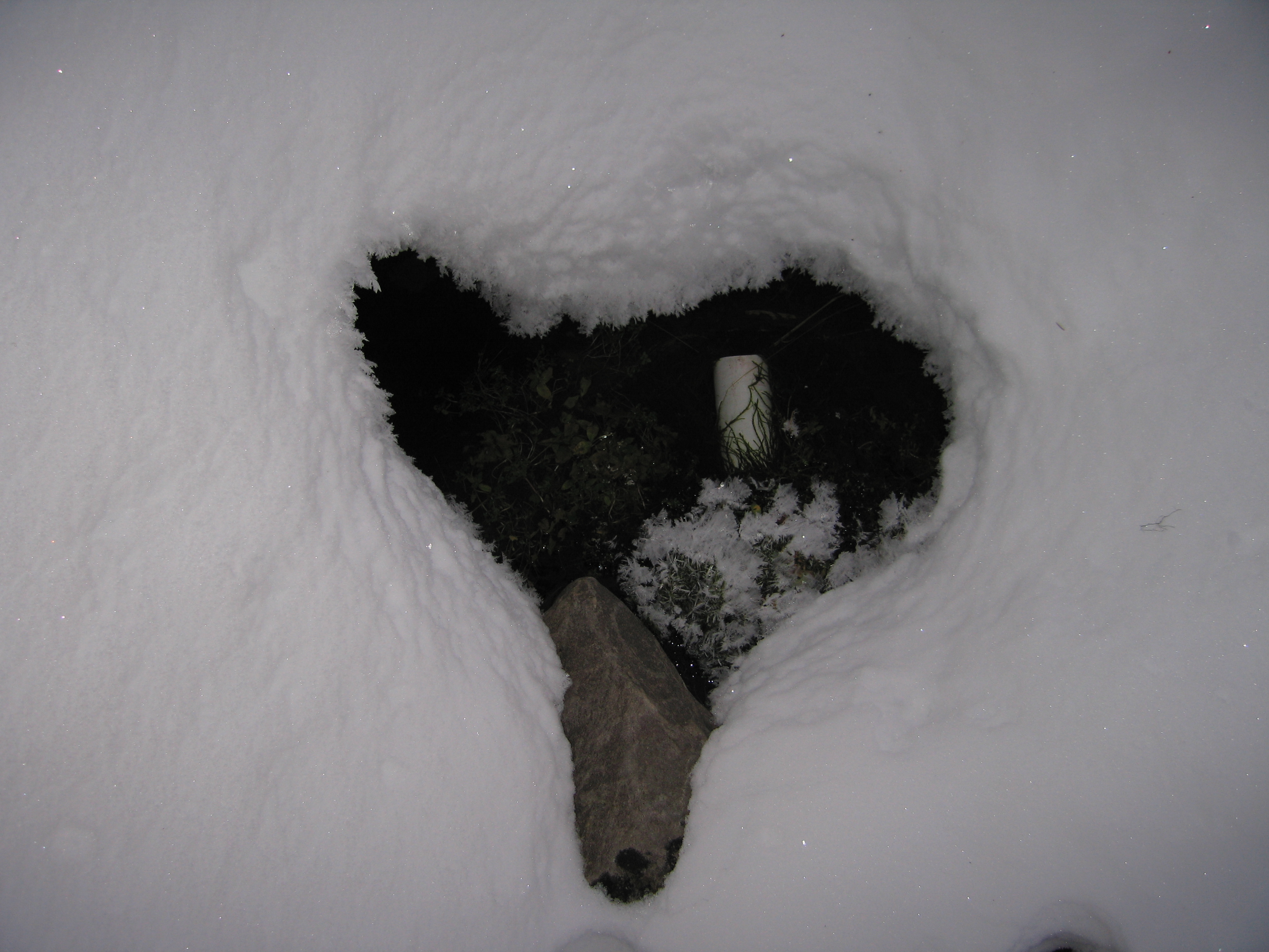 Kilde i Åstadalen, Hedmark. Grunnvannets stabile temperatur året gjennom hindrer isdannelser vinterstid. Bildet er tatt i en kuldeperiode (-20º).